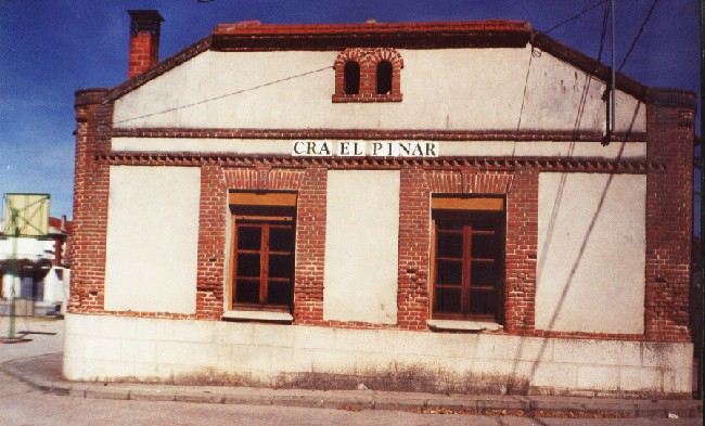 Colegio de Primaria de Narros de Cuellar, Segovia, España